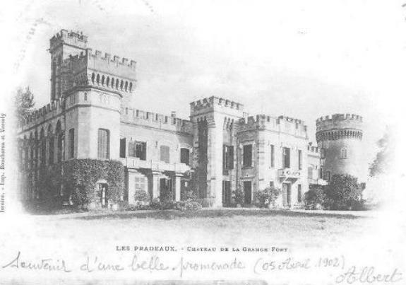 carte postale ancienne grangefort 2